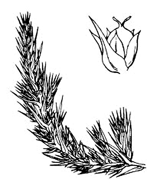 Grand polycnémum